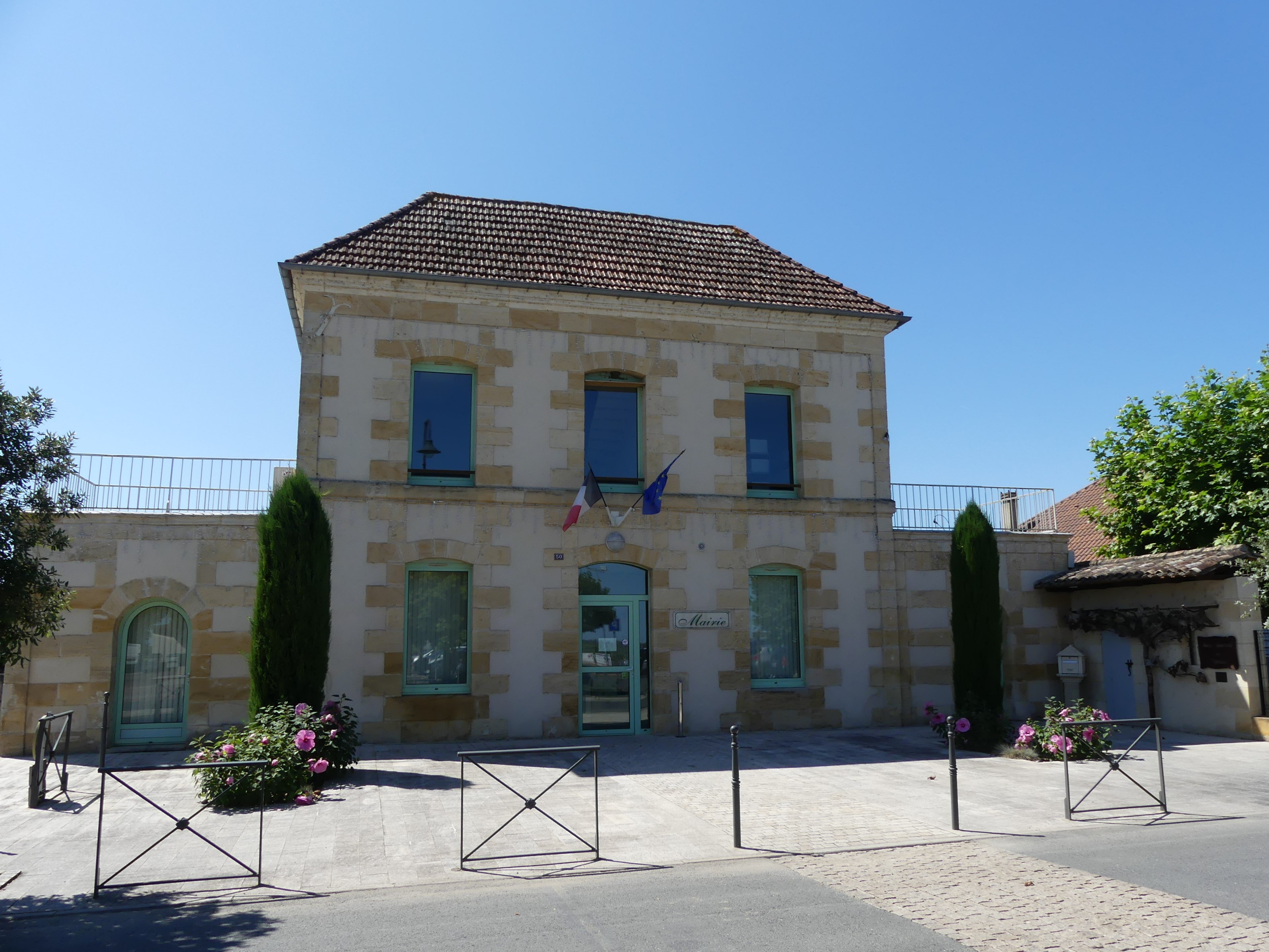 La mairie de Saint-Laurent-des-Vignes, Dordogne, France.